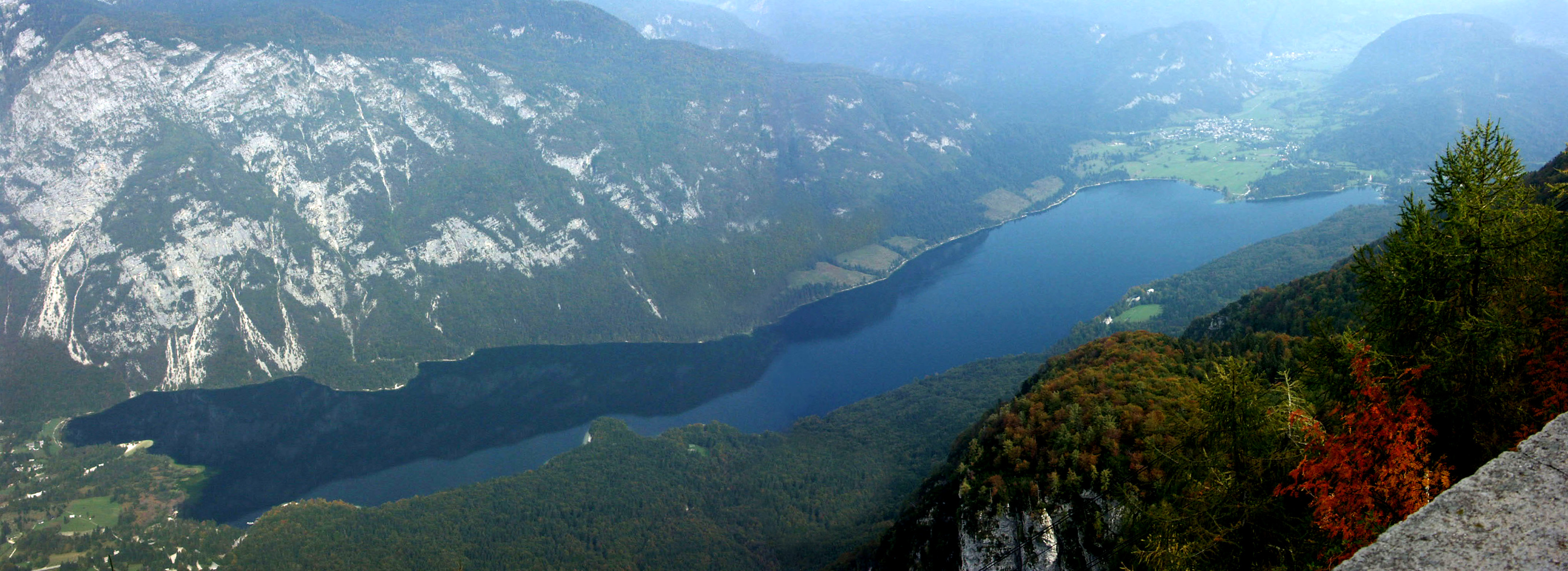 Wocheiner See, Gesamtansicht vom Berg Vogel aus